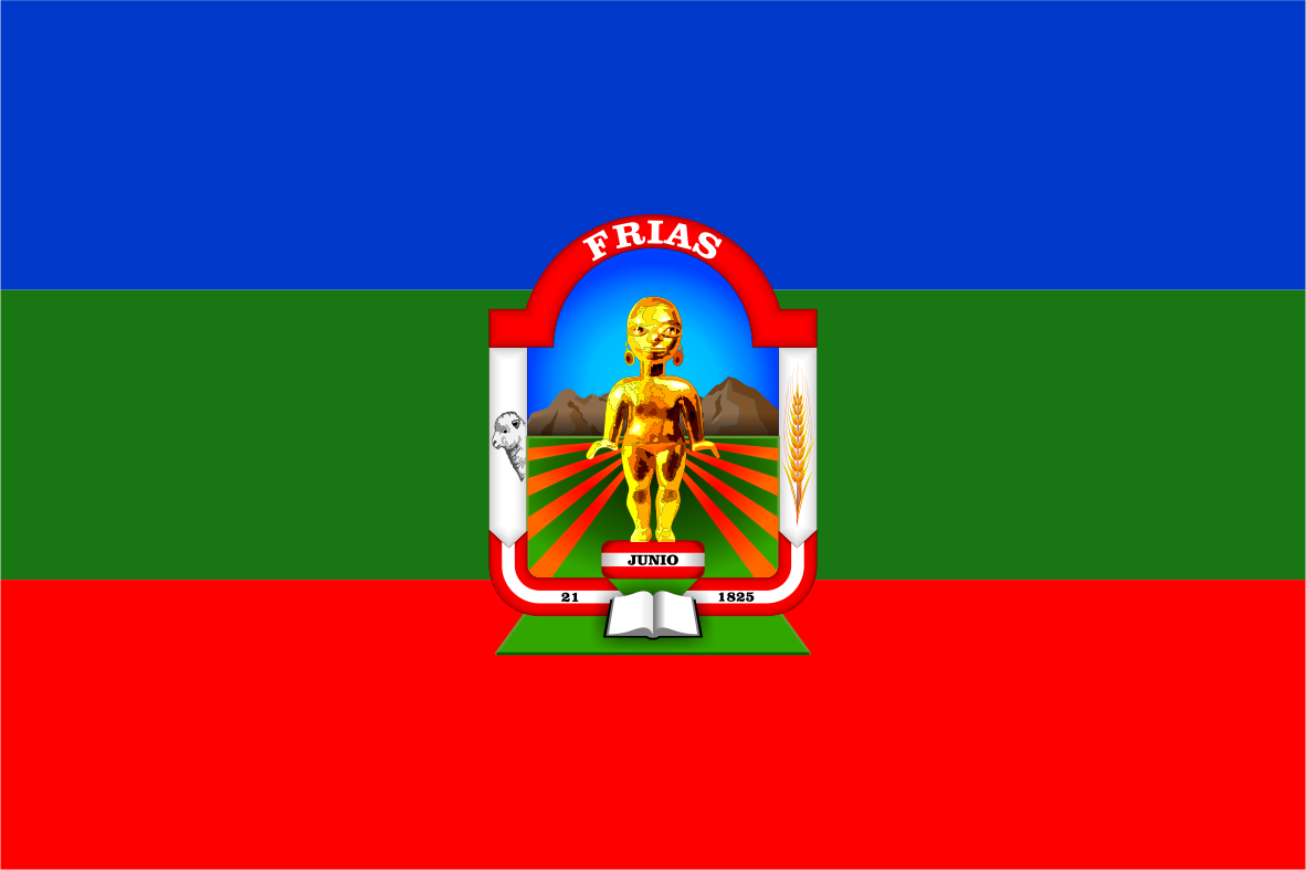 Distrito de Frías - Provincia de Ayabaca - Región Piura